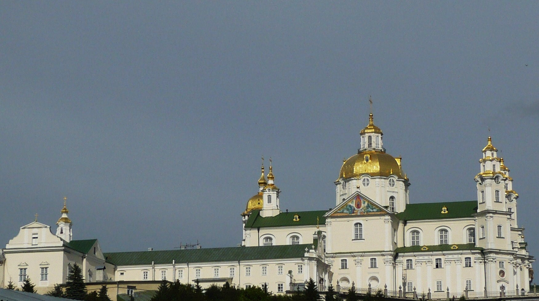 Ławra Poczajowska